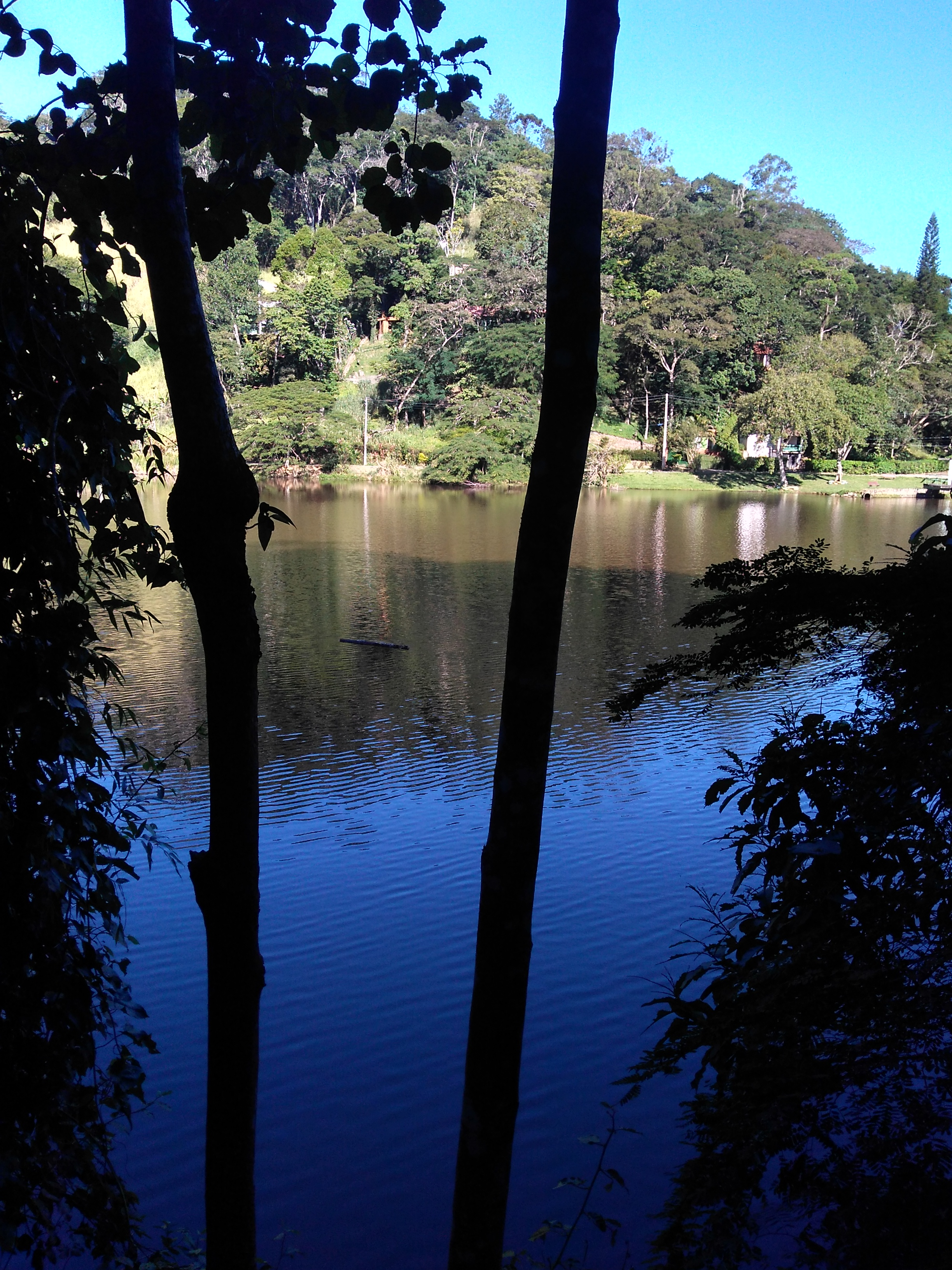 Lago de Caiçara, Piraí